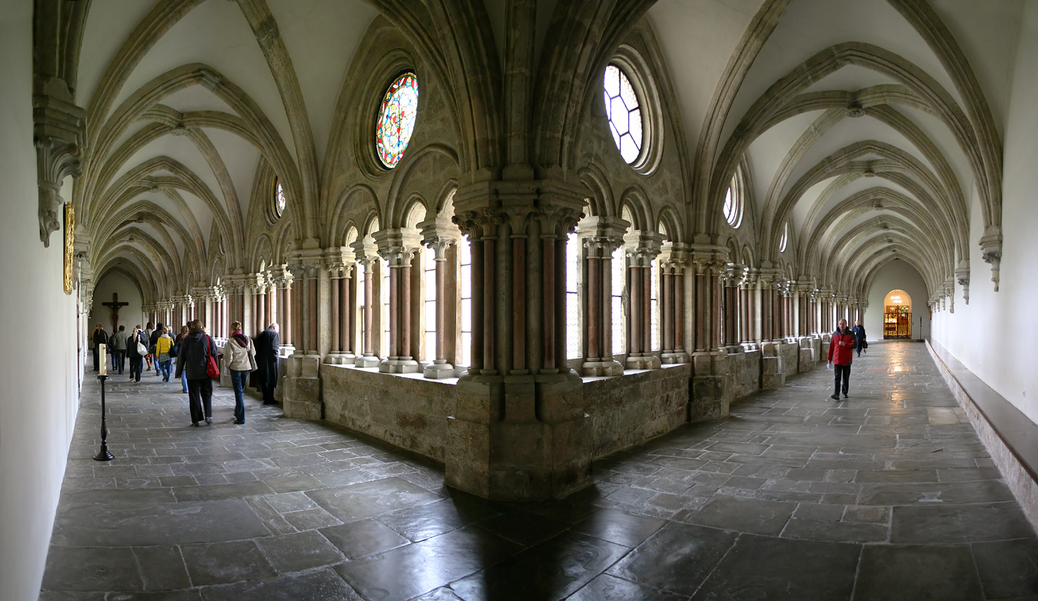 Kreuzgang des Stifts Lilienfeld, Niederösterreich